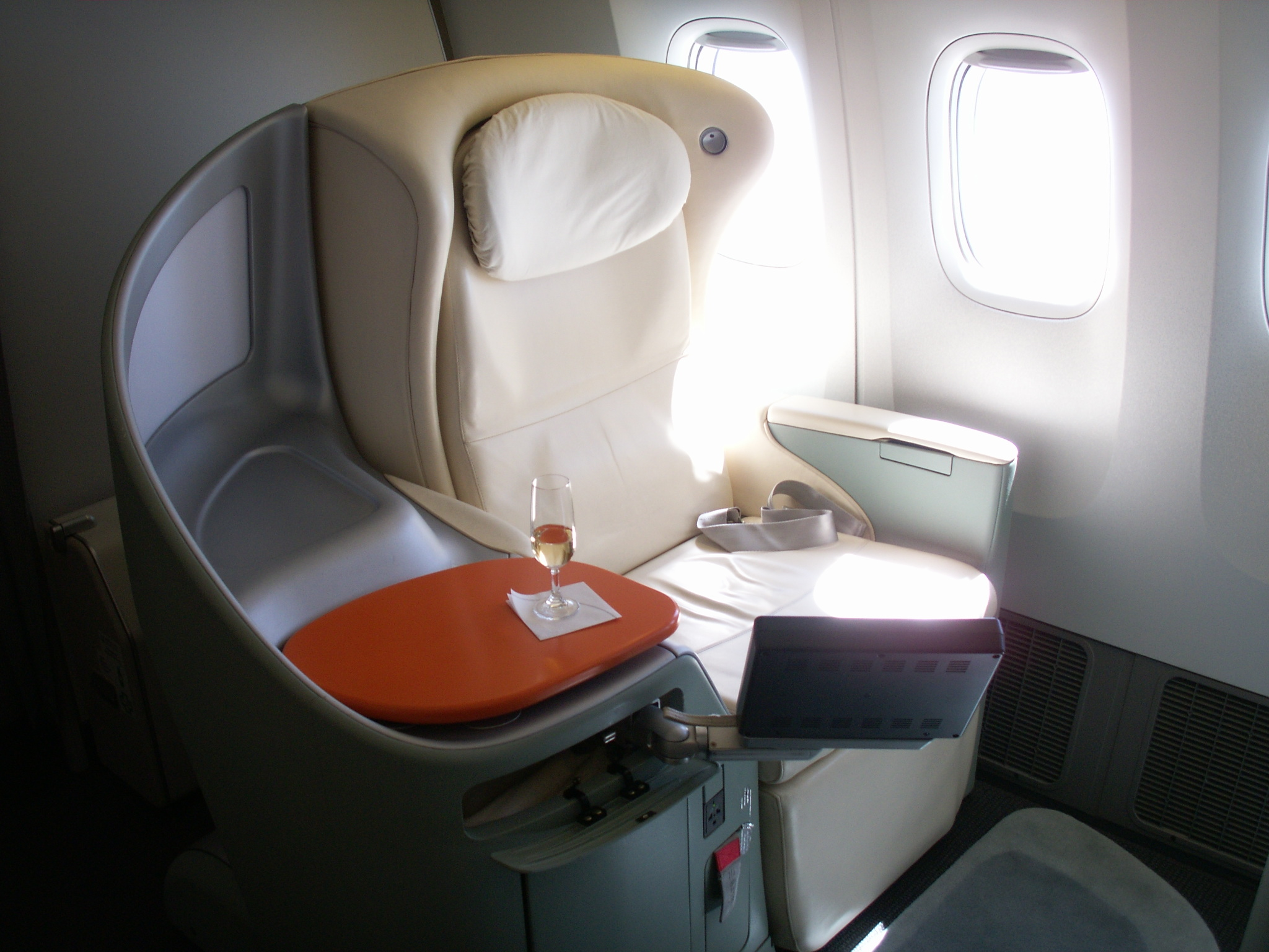 2006年5月4日、投稿者が撮影 ボーイング７７７－３００ER機・日本航空